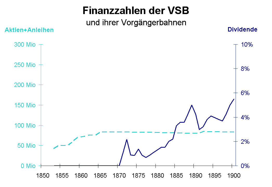 Aktienkapital und feste Anleihen sowie Dividende Aktien sind Anteile am Grundkapital des als Aktiengesellschaft konstituierten Bahnunternehmens. Sie sind hier im Nennwert angegeben, der jedoch in keiner Weise dem Kurswert entsprechen muss. Viele Bahnen haben im Laufe der Zeit ihr Aktienkapital erhöht, was gewöhnlich auf eine Expansion der Bahn hindeutet. Eine Verminderung des Aktienkapitals wurde bei finanziellen Schwierigkeiten vorgenommen, indem durch Herabsetzung des Nennwerts der Aktien Kapital für das Unternehmen freigesetzt wurde (sogenannter Kapitalschnitt). Feste Anleihen waren neben Aktien die wichtigste Form der Geldbeschaffung für die Bahnen. Das vom Unternehmen aufgenommene Kapital wird über eine bestimmte Laufzeit zu einem bestimmten Zinssatz verzinst. Die Zinslast für Anleihen war ein gewichtiger Ausgabeposten insbesondere der grossen Bahnen. Wenn wegen zu geringen Erträgen die Zinsen nicht mehr bezahlt werden können, droht der Konkurs. Die Dividendenauszahlungen für die Aktionäre sind hier im Verhältnis zum Nennwert der Aktien angegeben.